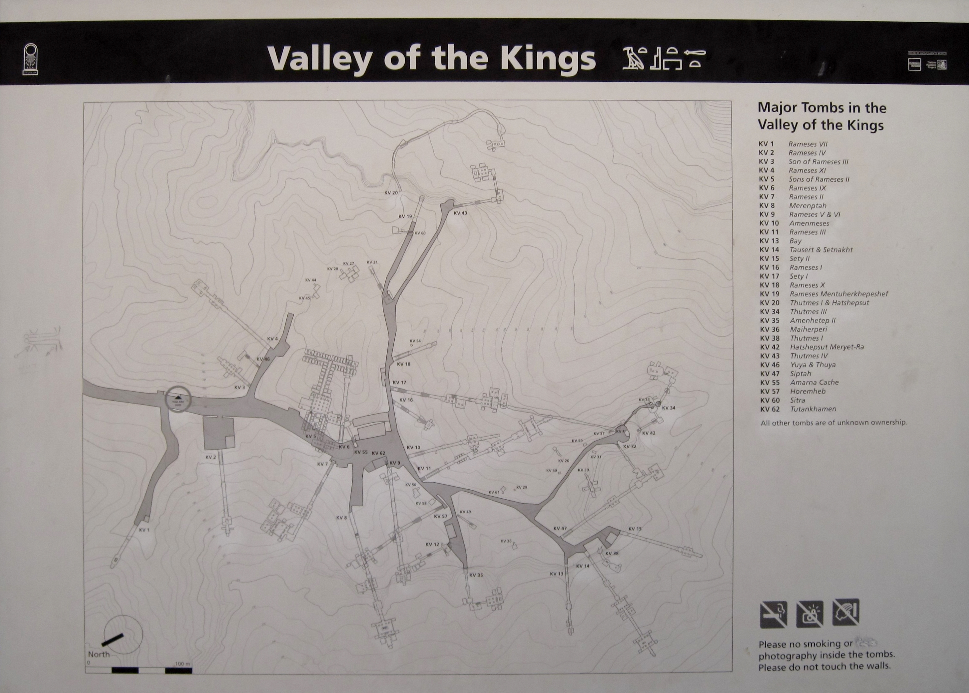 Karte des „Tals der Könige“ auf einer Informationstafel im Tal, Theben-West (Luxor), Ägypten